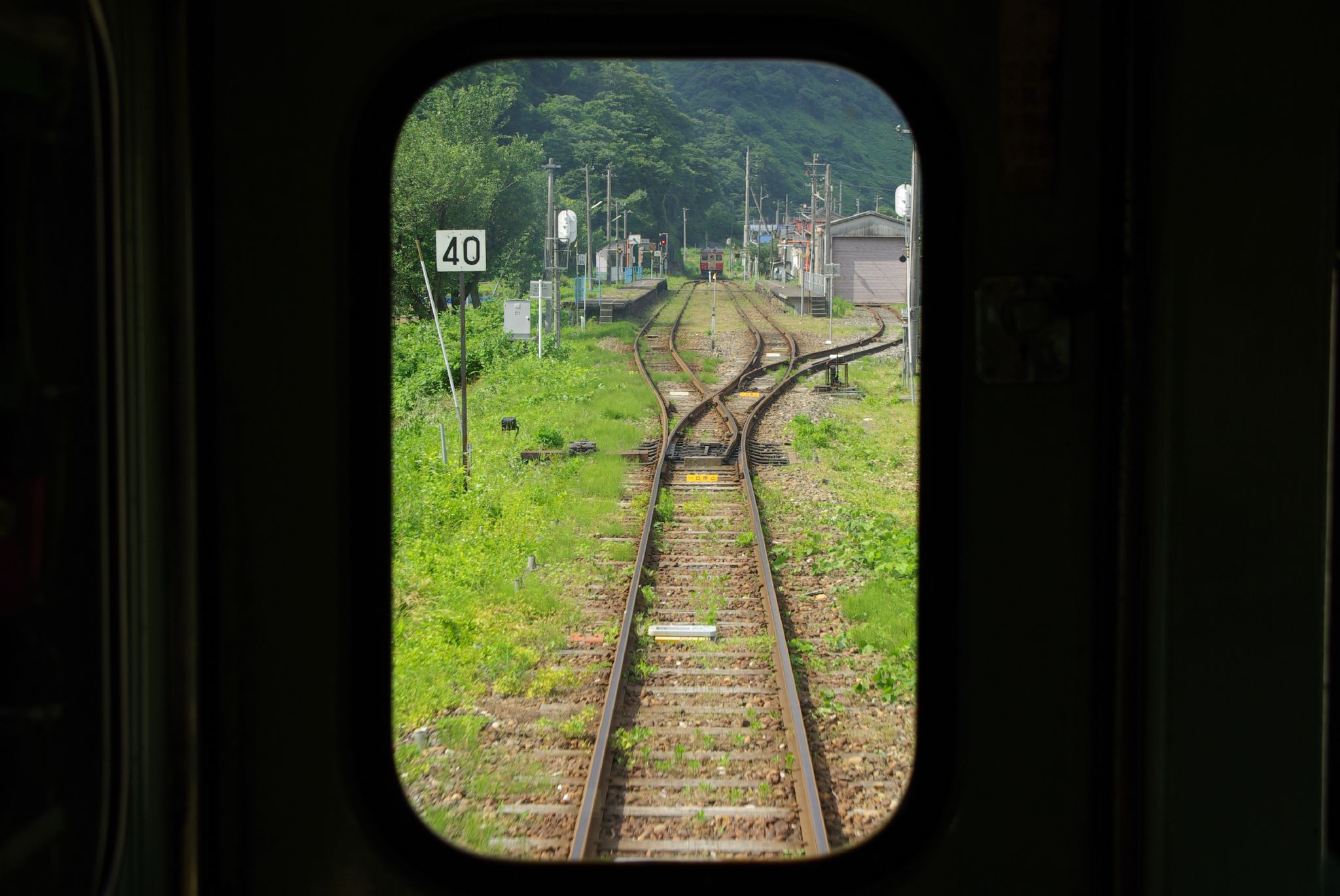 根知駅。 8年くらい前は北小谷・平岩・小滝等も列車の行き違いが出来ていたような気がするが、今はここ根知駅だけになってしまった。